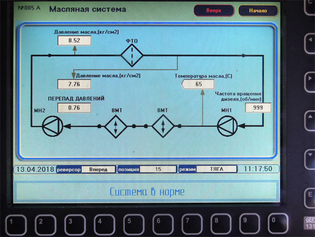 Кадр дисплея «Масляная система» тепловоза 2ТЭ25КМ на 15-й позиции (номинальном режиме работы дизеля). ФТО — фильтр тонкой очистки, МН — масляный насос, ВМТ — водомасляный теплообменник.